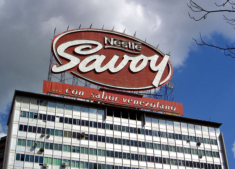 Este aviso permanece ahí incólume desde hace muchos años, especialmente de noche es visible y quien ha visitado a Caracas seguramente lo ha visto, es un ícono y dicho sea de paso sus chocolates son sinónimo de calidad...a mejorar el endotelio.